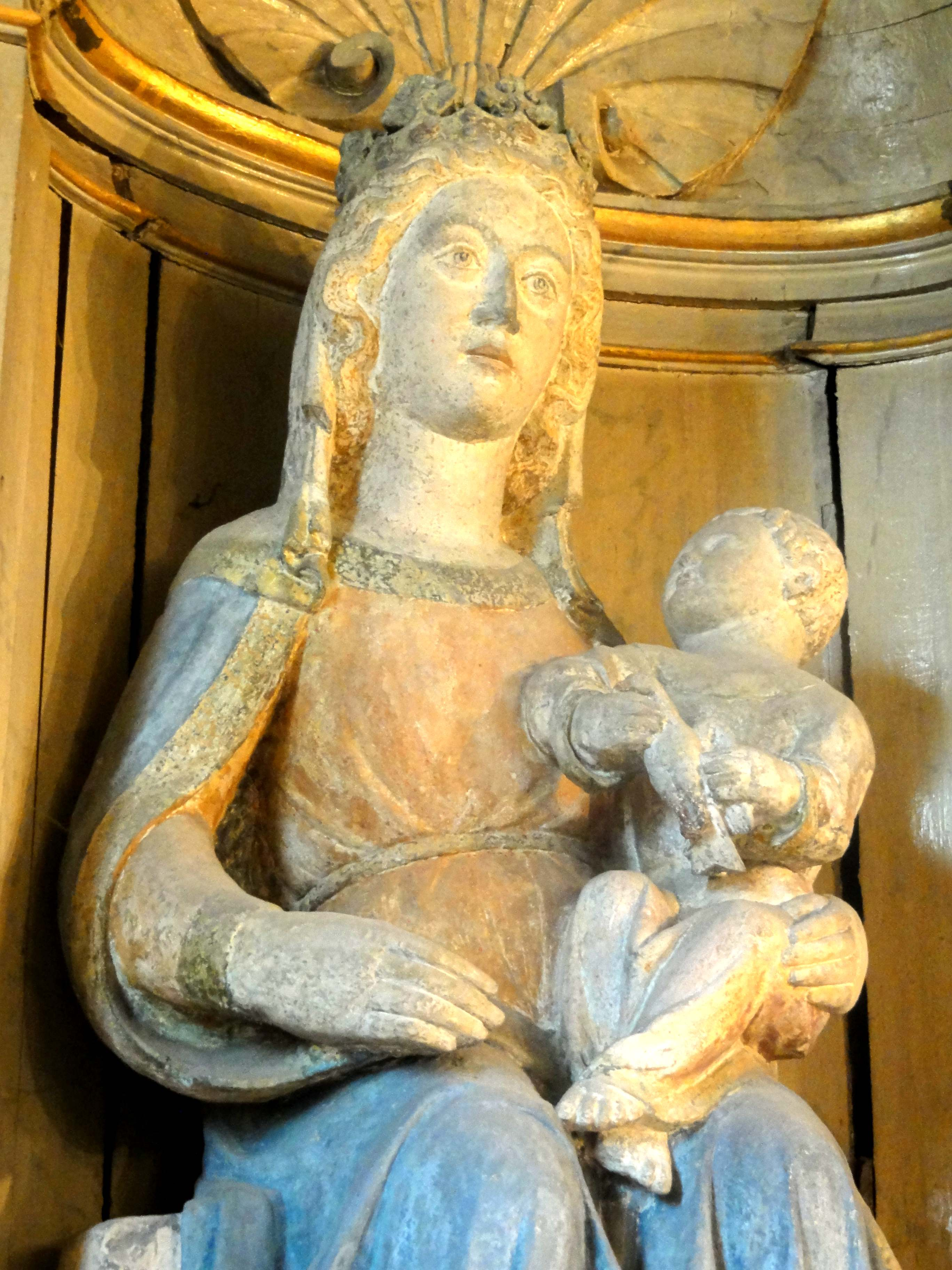 Vierge à l'Enfant.